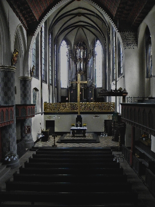 Innenraum, Uni-Kirche marburg, expresionistisch